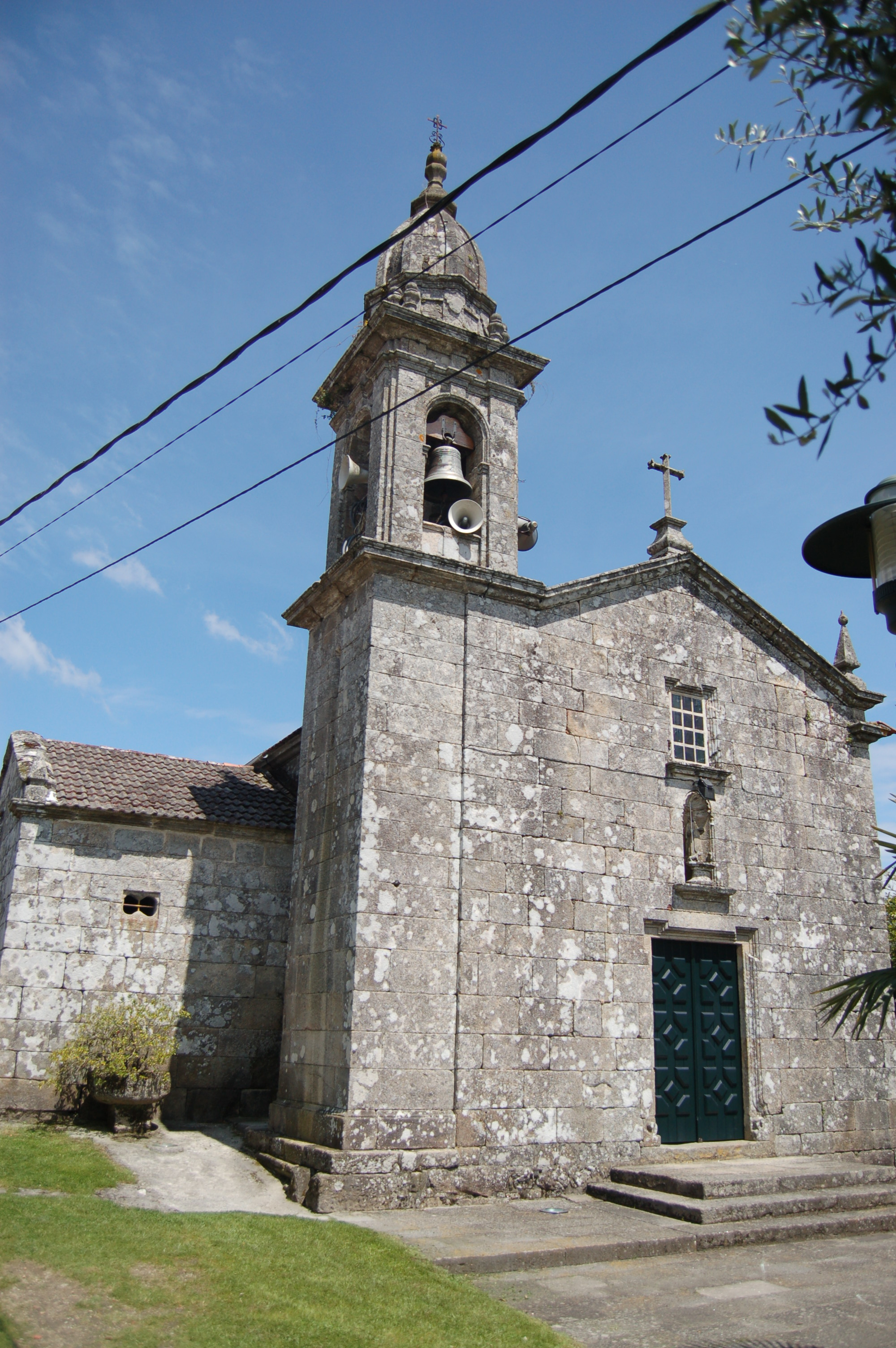 Igrexa parroquial de San Vicente de Cerponzóns (Pontevedra)